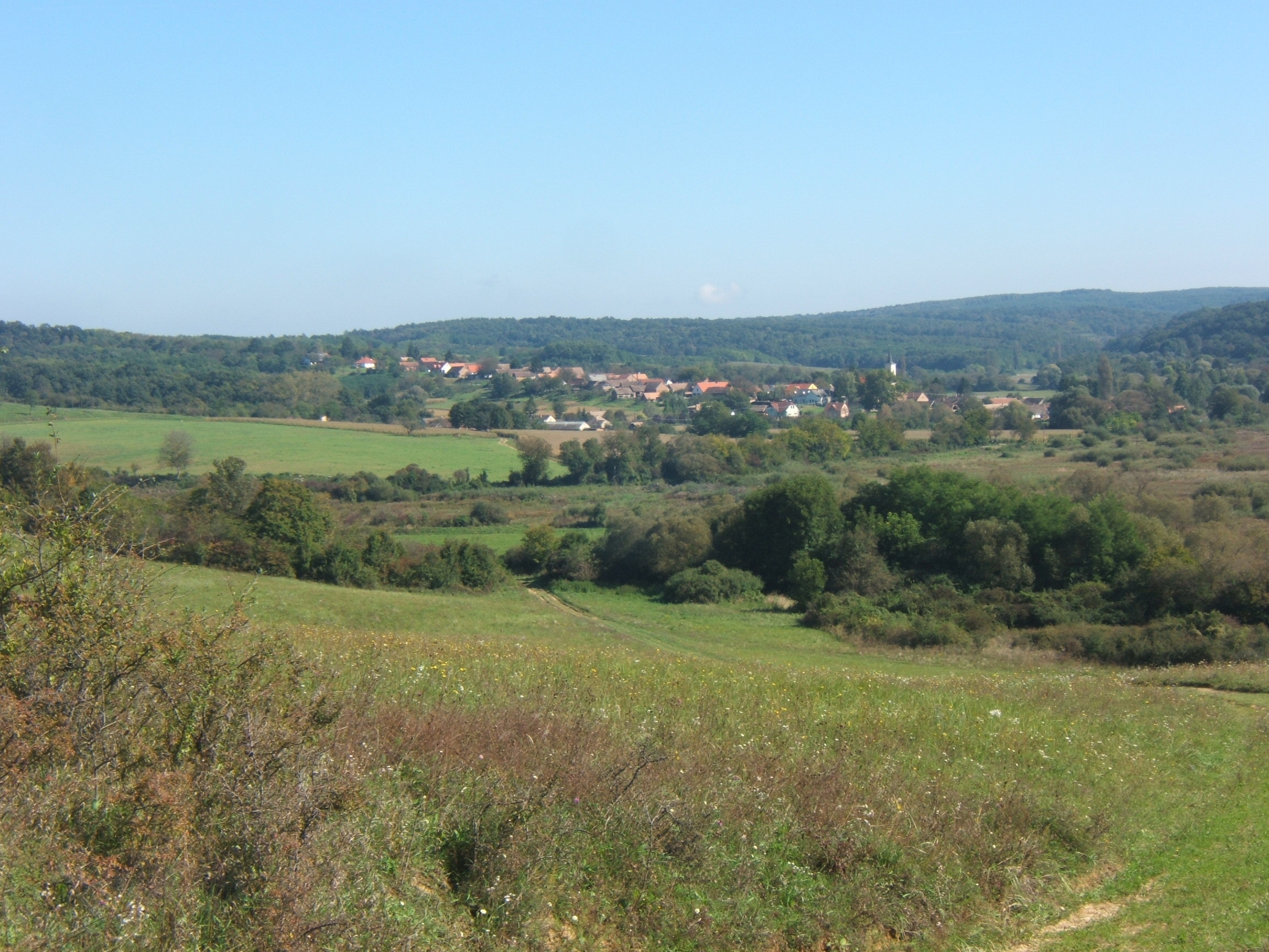 Ibafa látképe a szőlőhegy irányából